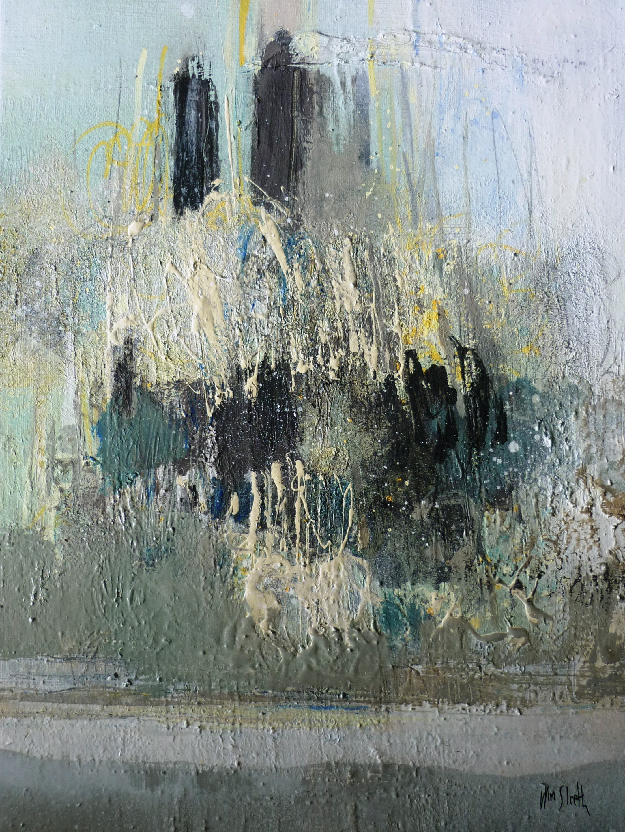 Composition: Notre Dame de Paris, 2011